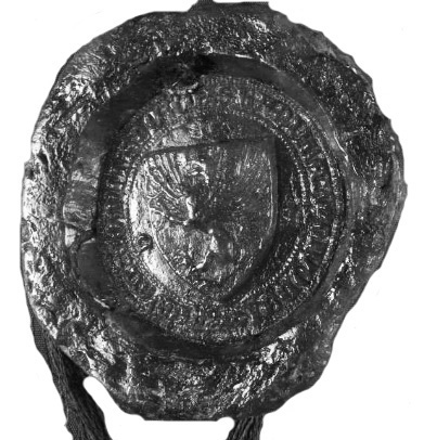 Losonci (Dezsőfi) László erdélyi vajda és szolnoki ispán pecsétje 1391-ből